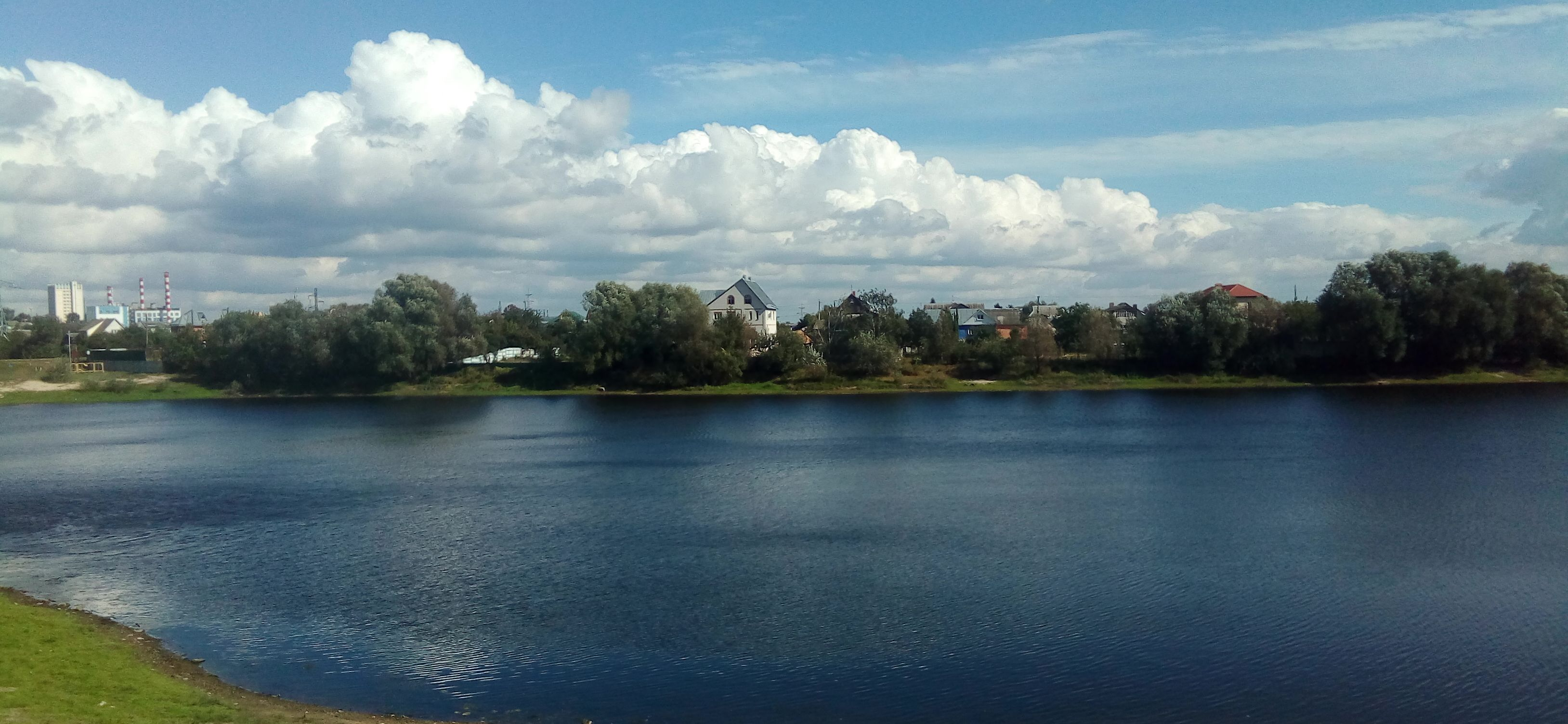 Монастырек, вид со стороны Любенского озера